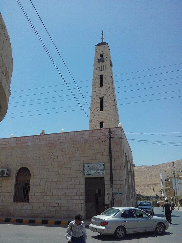 Нохчийн: Сухне эвла